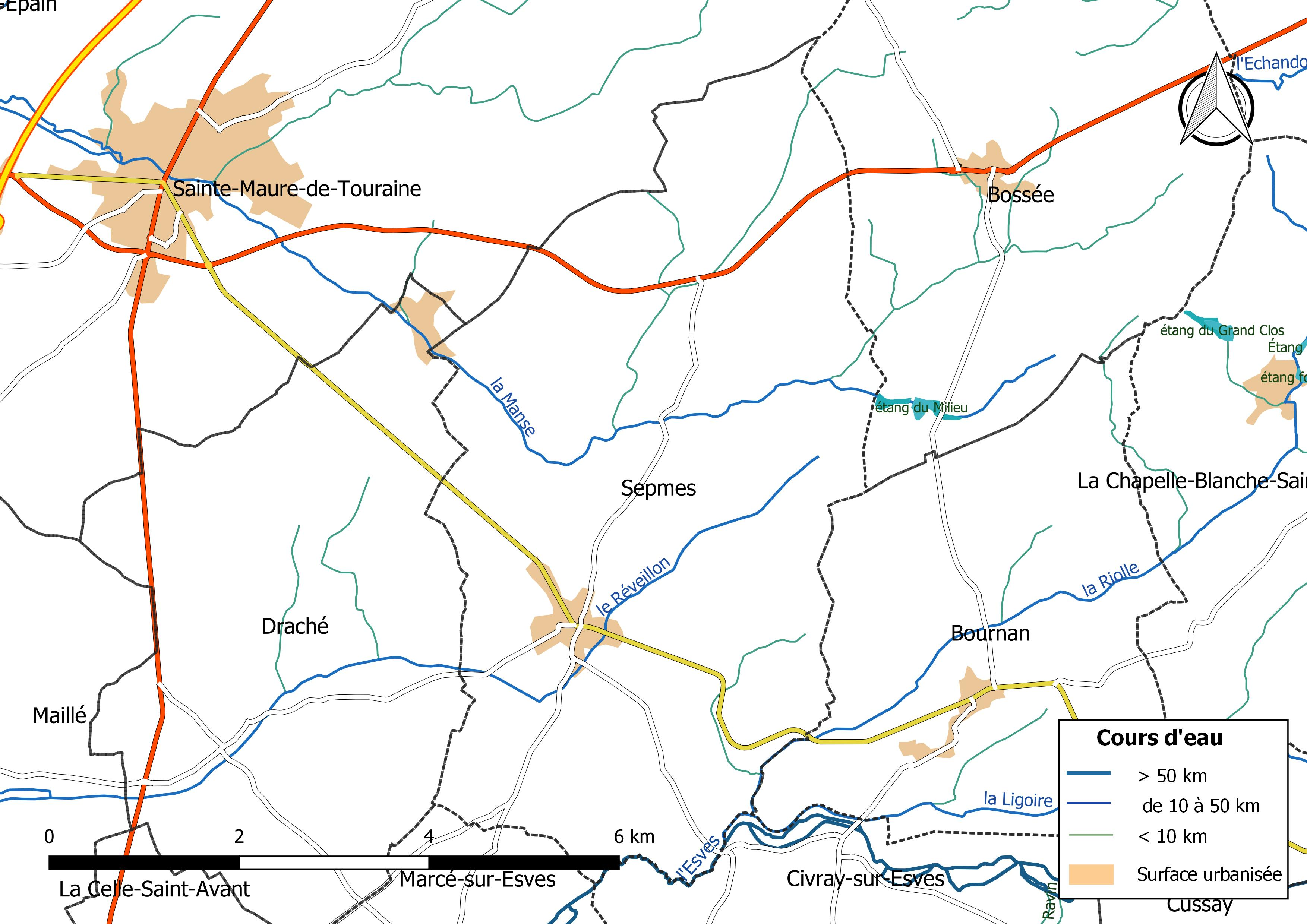 Carte du réseau hydrographique de la commune de Sepmes (France).